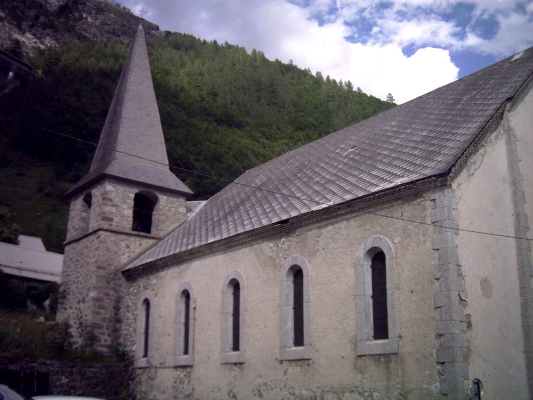 L'église Saint-Vincent de Champoléon (Hautes-Alpes), vue latérale.